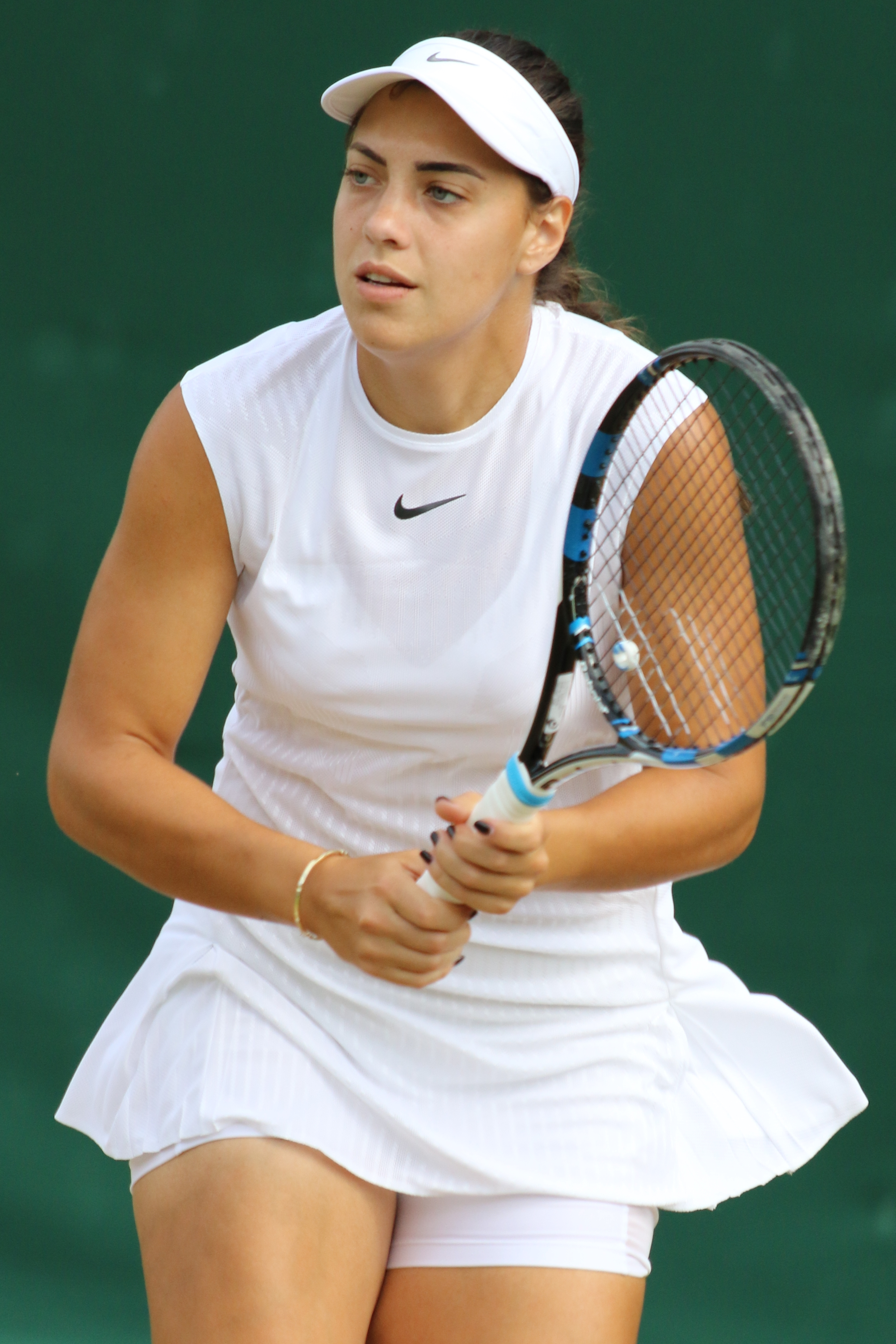 Konjuh WM17 (23)